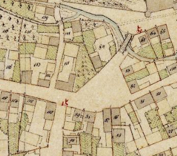 Kartenausschnitt Urkataster Bayern, Marienplatz Wiesentheid